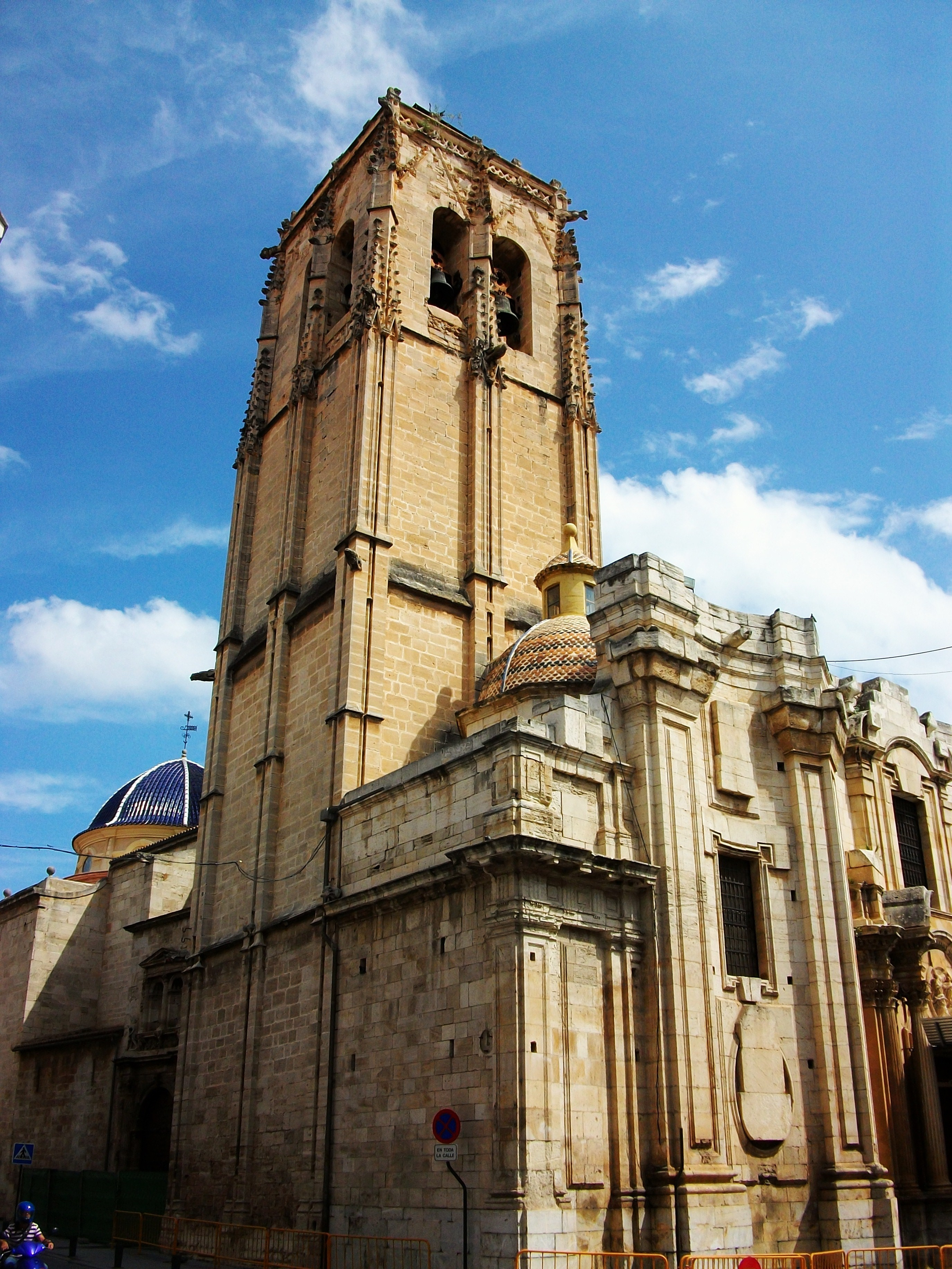 Església de les santes Justa i Rufina, Oriola, Baix Segura.